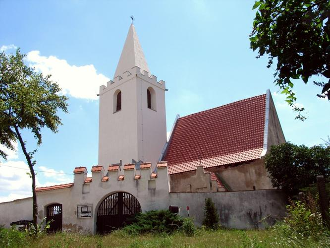 Kostel Staré Ždánice